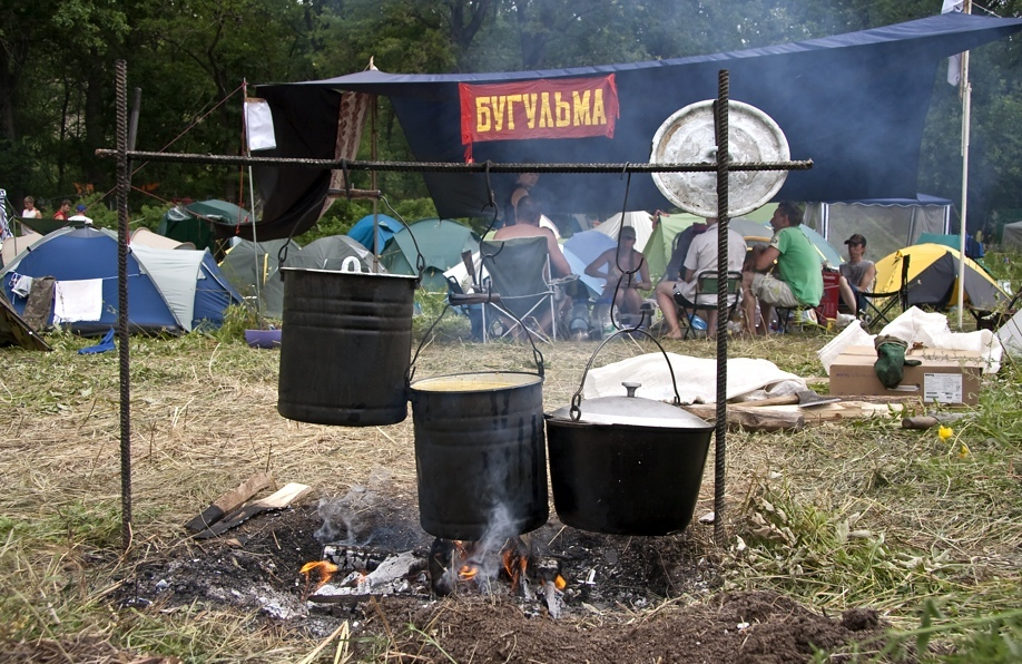 Грушинский фестиваль, Самарская область, Россия